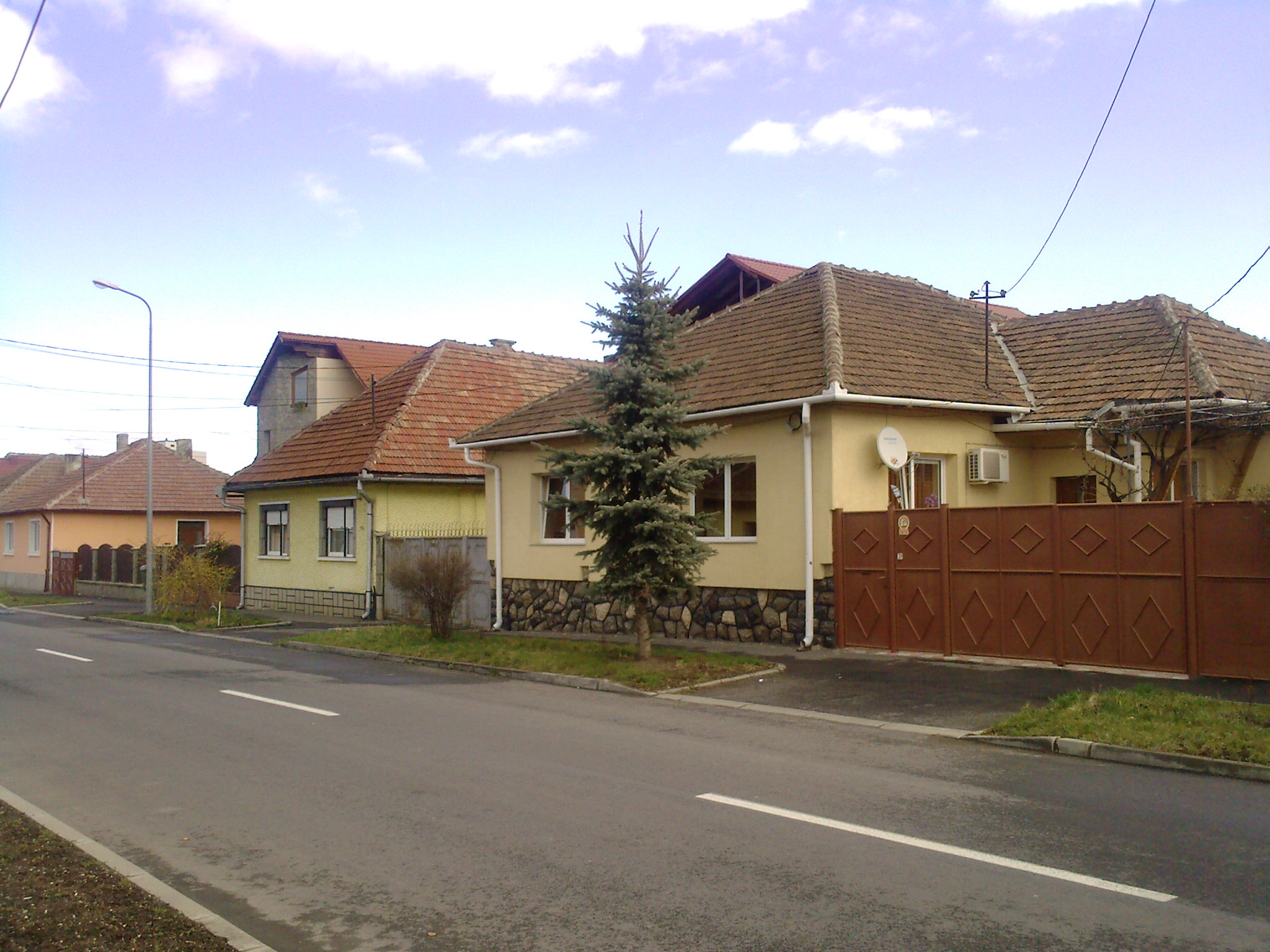 Quartier Craiter, Braşov, Roumanie